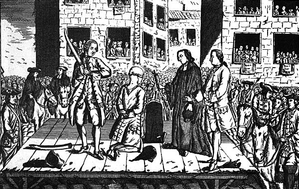 Décapitation de Thomas Arthur de Lally-Tollendal (par Ch. H. Sanson) le 9 mai 1766, en place de Grève, Paris.